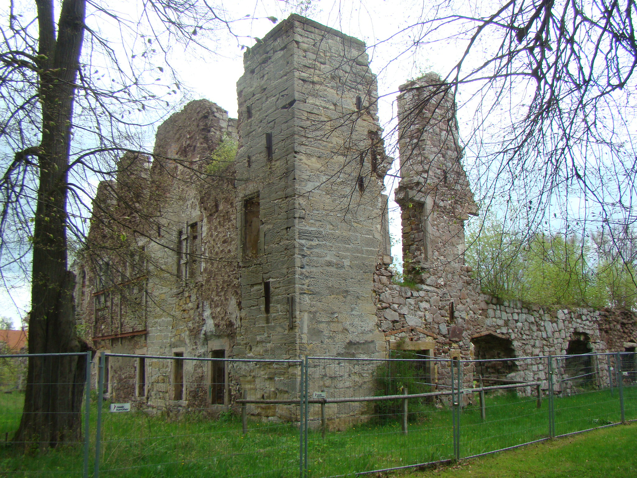 Schlossruine Gehren